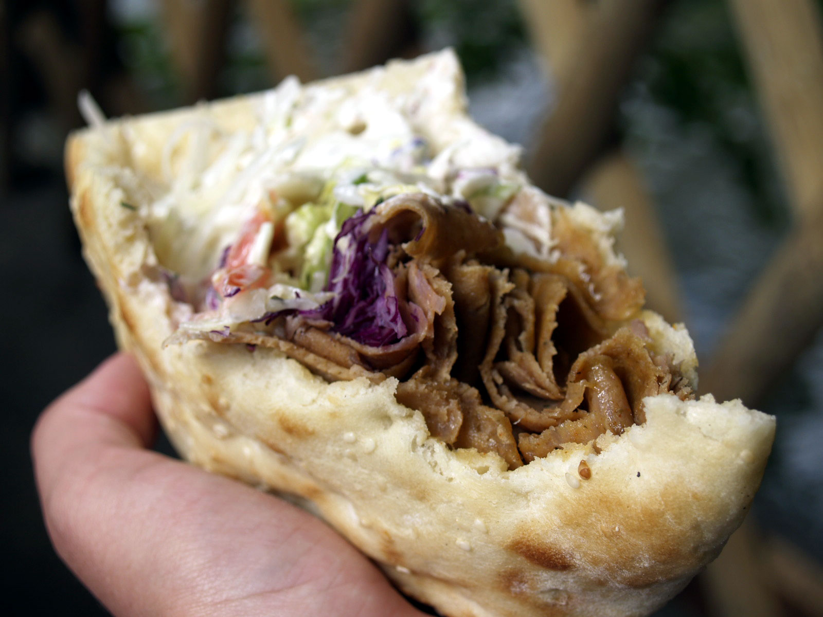 Shawarma